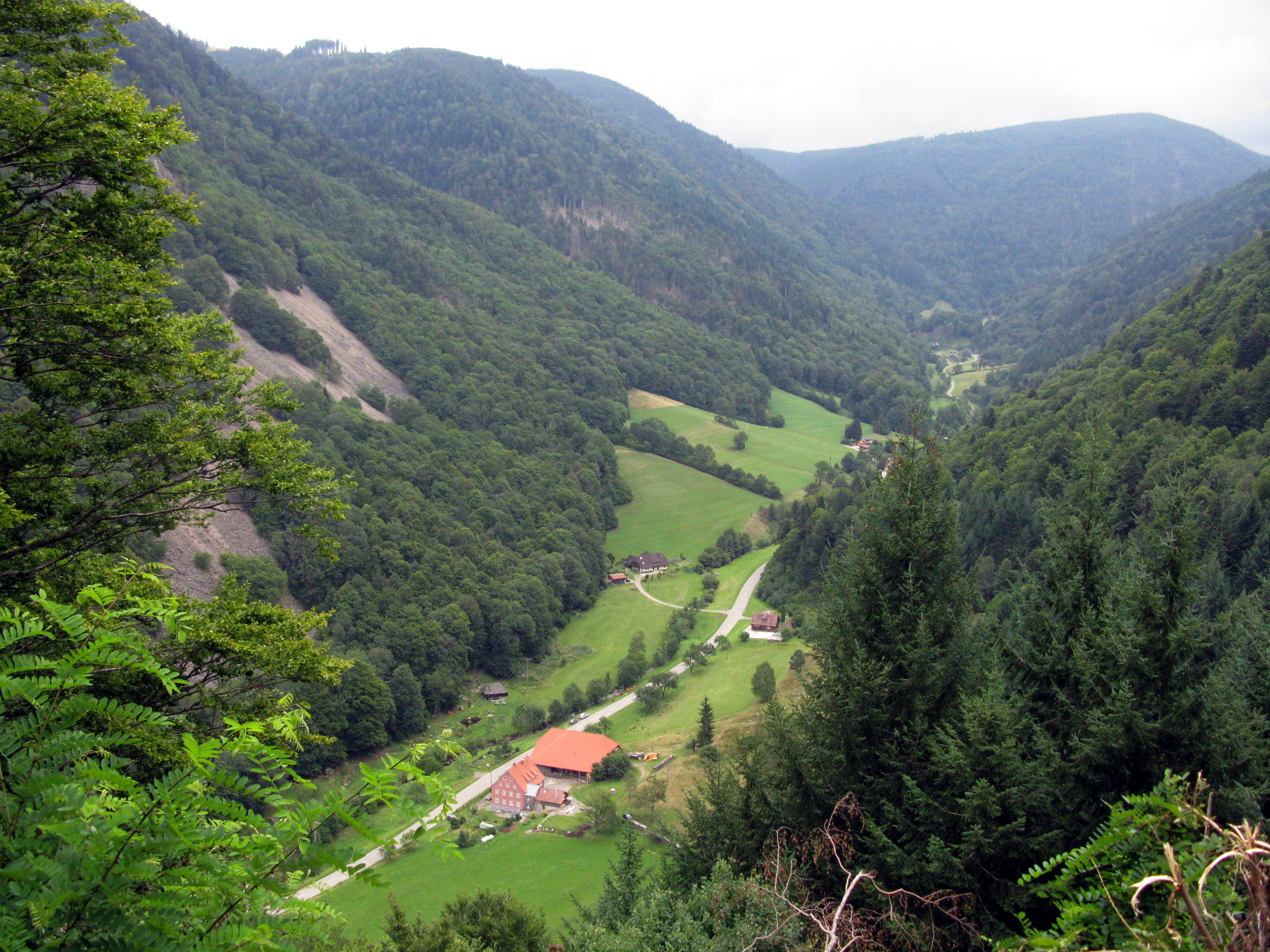 Zastler Tal